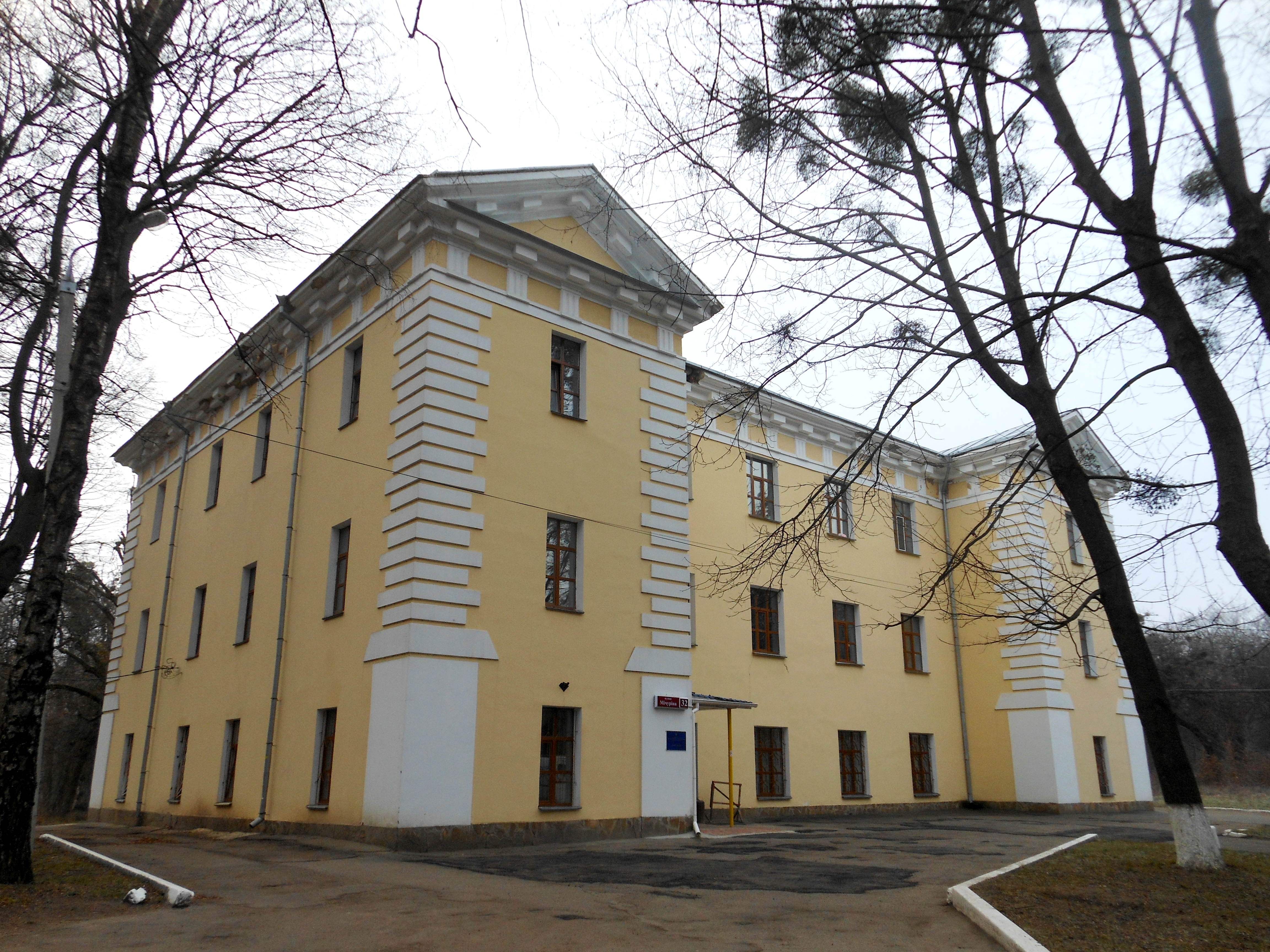 Палац, Вінниця, вул. Мічуріна.32